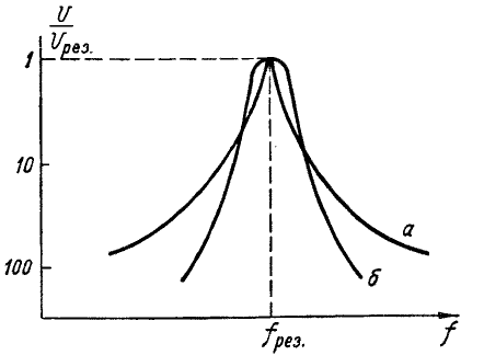 На графіку показано криві селективності радіоприймача: а) «гостра» селективність з яскраво вираженим піком — типова для регенеративного приймача прямого підсилення; б) рівномірніша селективність у деякій смузі частот